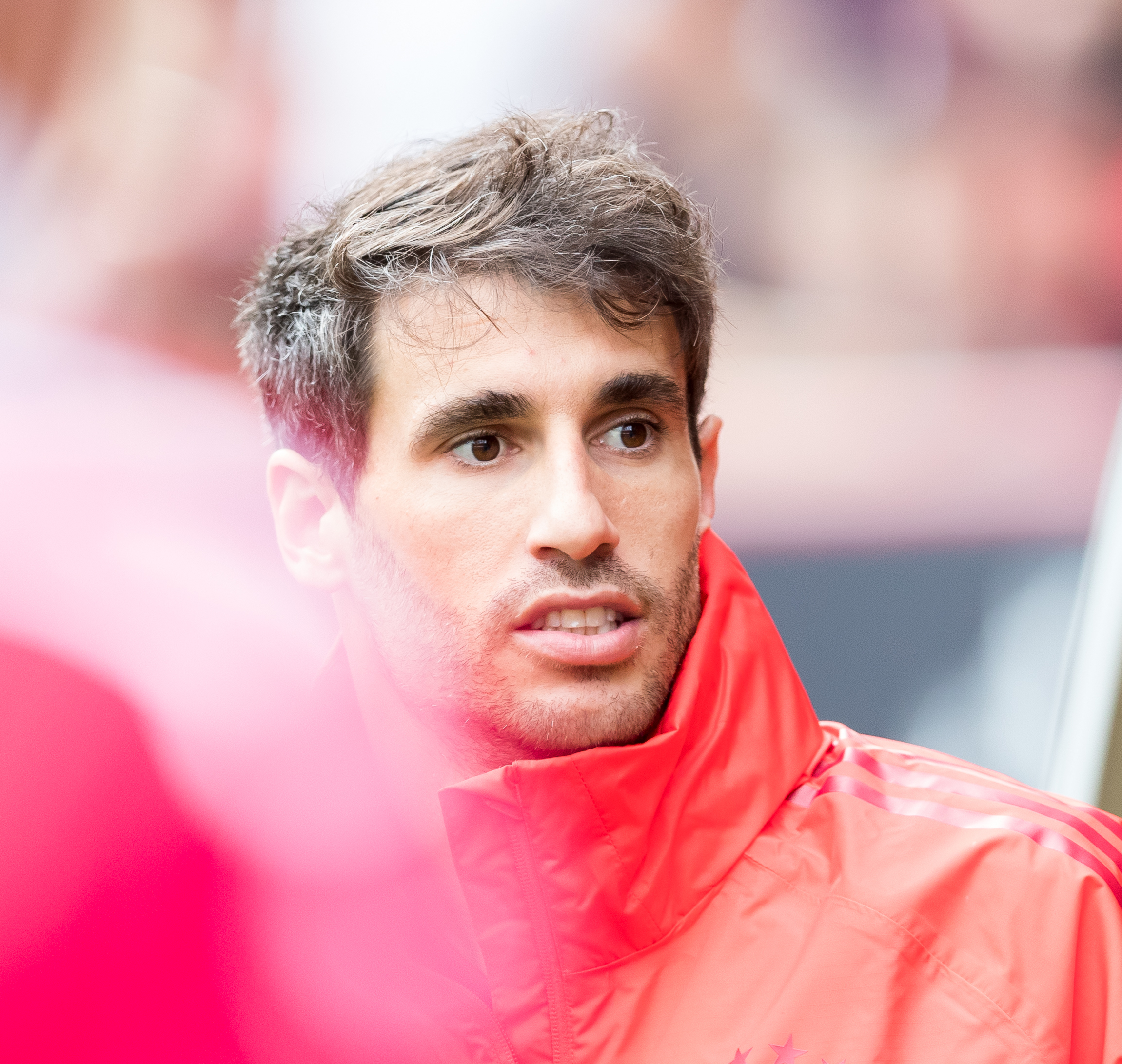 during 1.FC Kaiserslautern vs FC Bayern München at Fritz-Walter-Stadion, Kaiserslautern, Rheinland-Pfalz, Germany on 2019-05-27, Photo: Sven Mandel